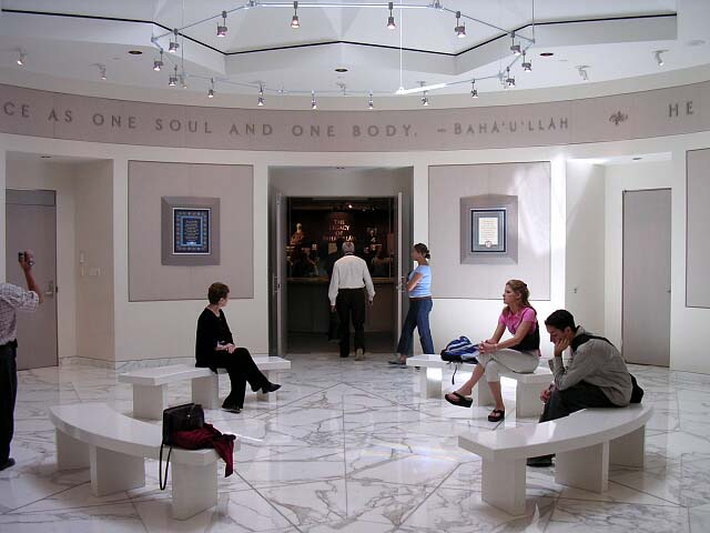 Bahá'í Visitors Centre